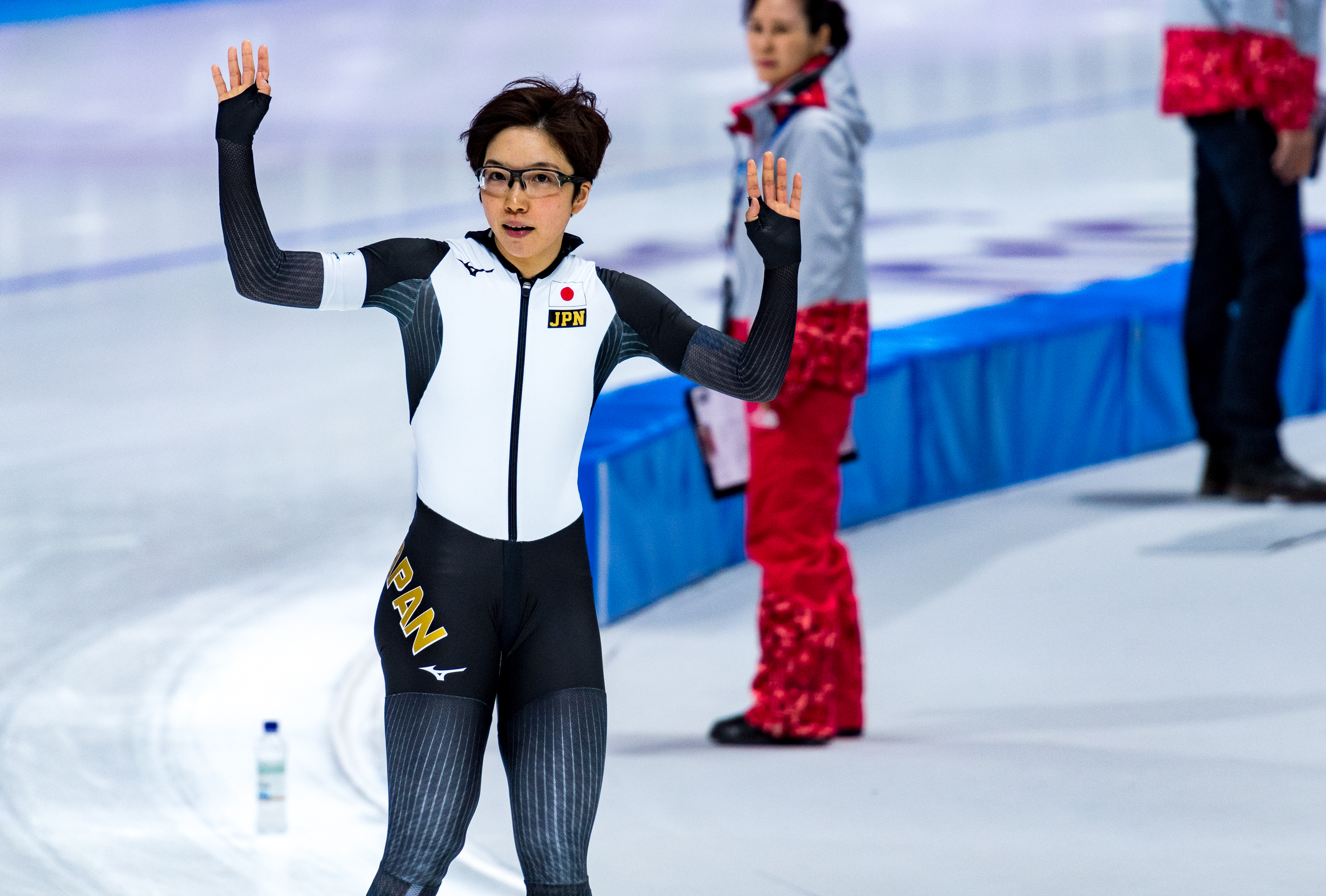 _DSC5291